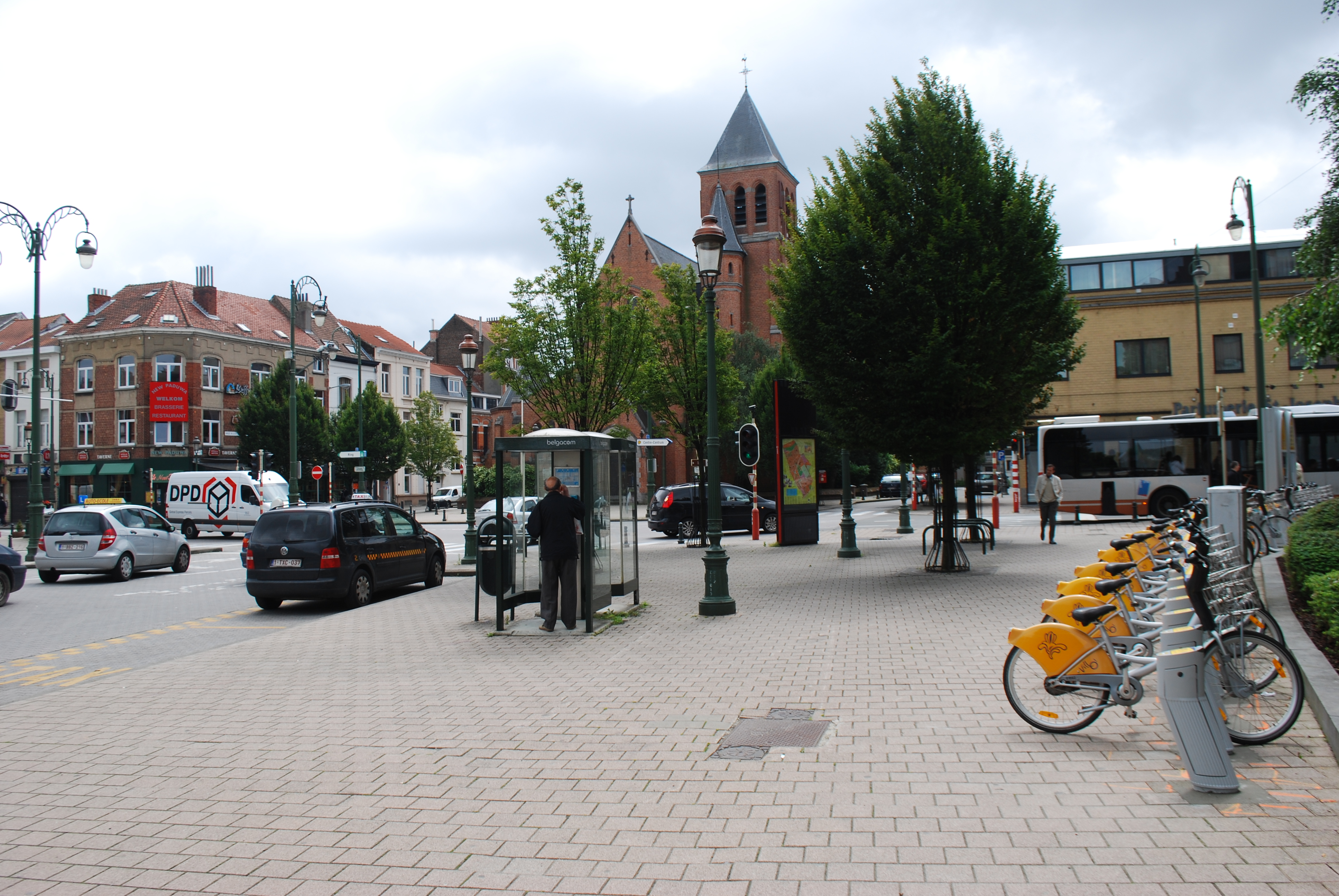 Vue de l'avenue des Anciens Combattants vers l'église Saint-Joseph à Evere (Bruxelles), la station de « vélos partagés », la station de taxis et les cabines téléphoniques